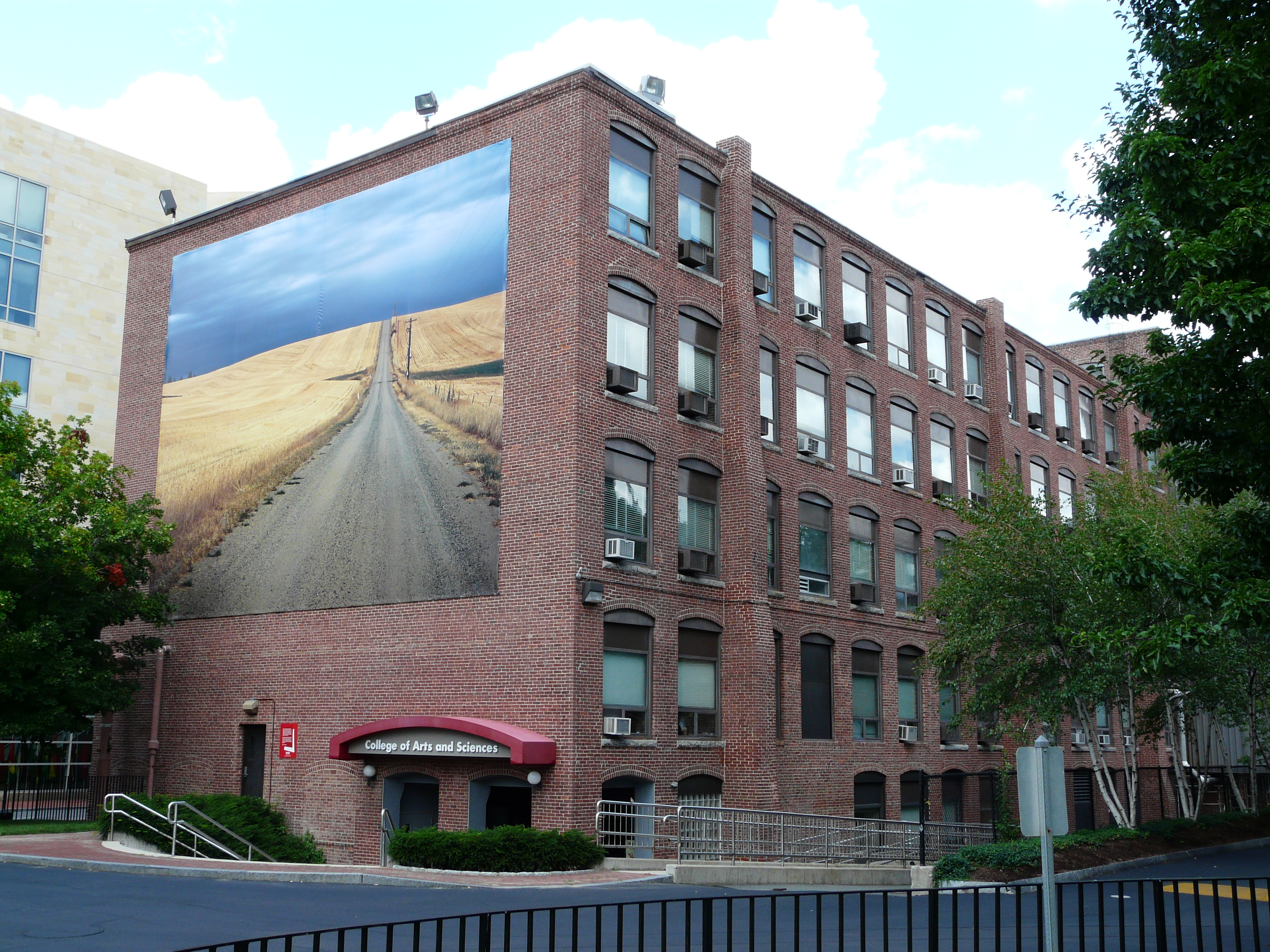 Boston